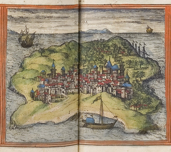 Quiloa / Kilwa